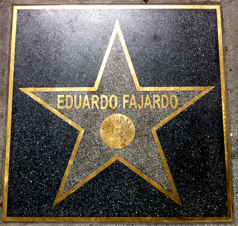 Estrella de Eduardo Fajardo en el 'Paseo de las Estrellas' en Almería